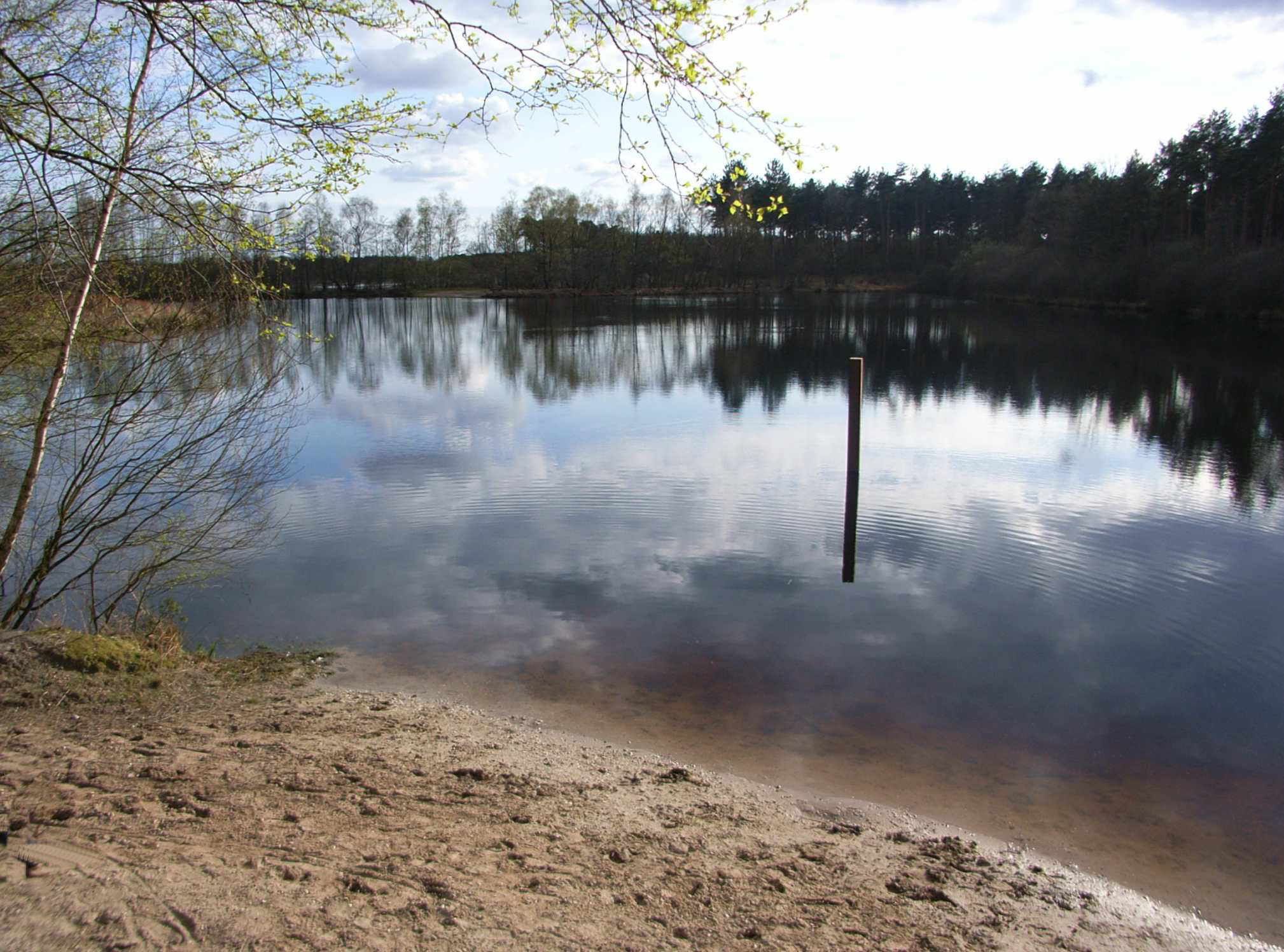 See an der deutsch-niederländischen Grenze im Elmpter Wald (Naturpark Schwalm-Nette)